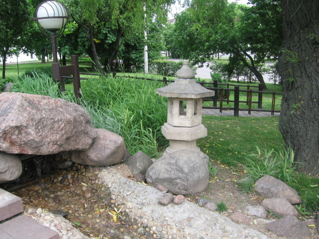 Сендайский сквер, Минск